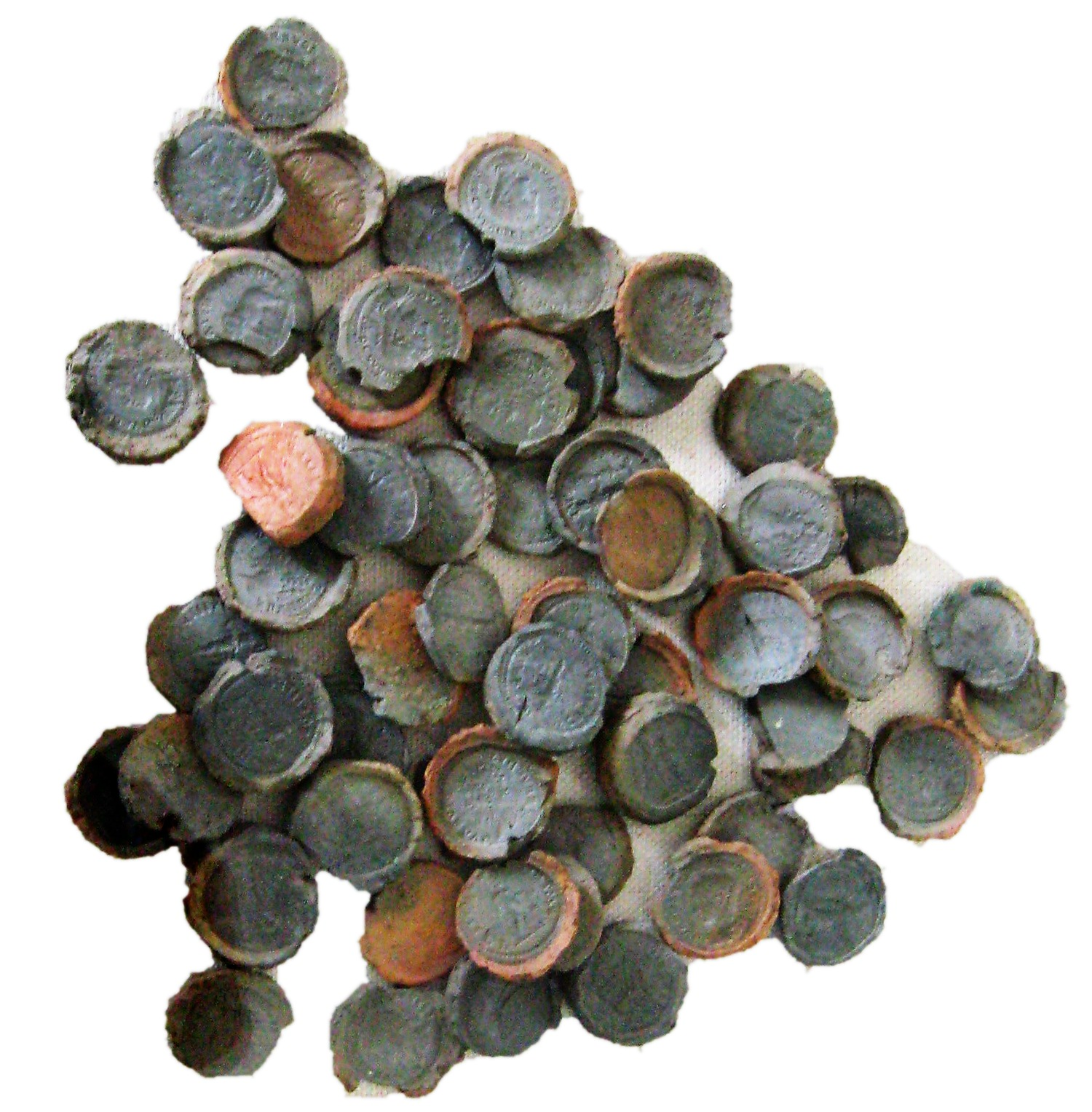 "Münzfälscherwerkstadt" von Pachten. Auswahl aus 2539 tönernen Münzgussförmchen. (um 225-268) Pachtener Museum.